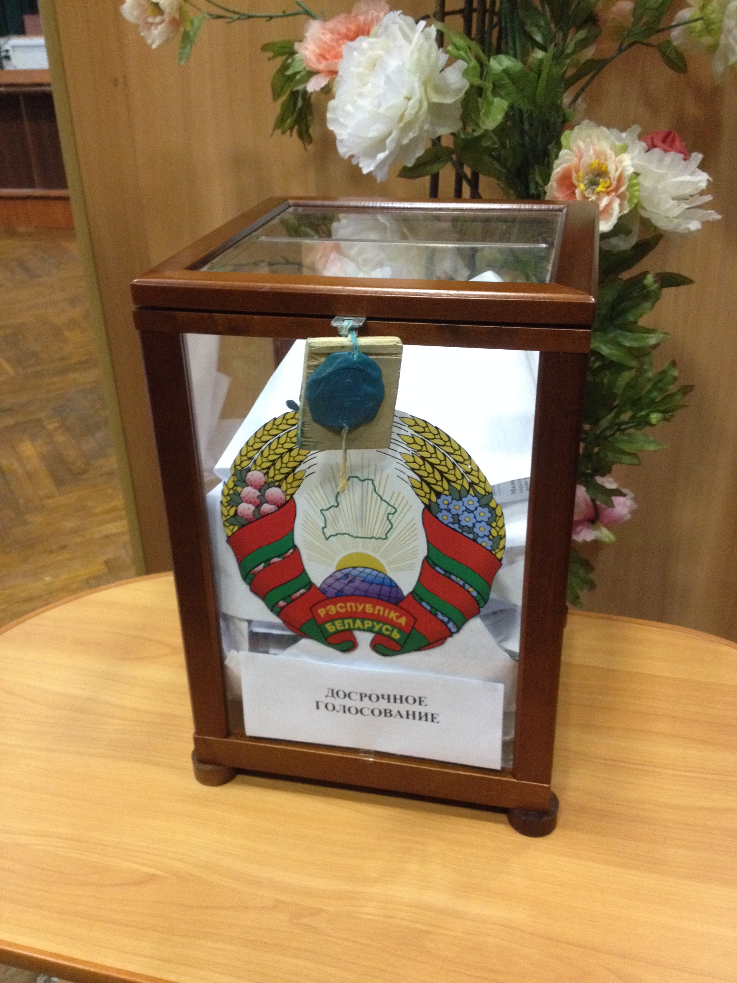 Wybory parlamentarne na Białorusi w 2016 roku.